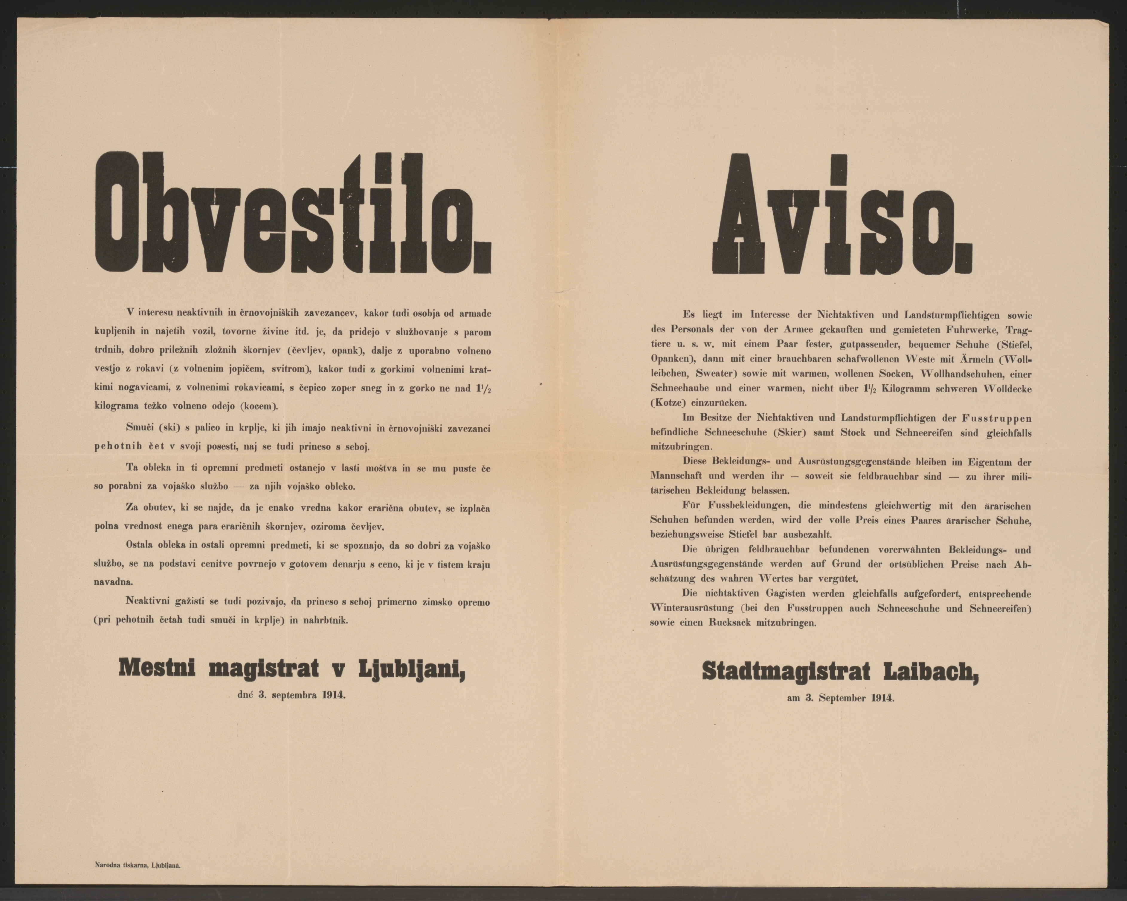 Bekleidung und Ausrüstung - Aviso - Laibach - Mehrsprachiges Plakat.